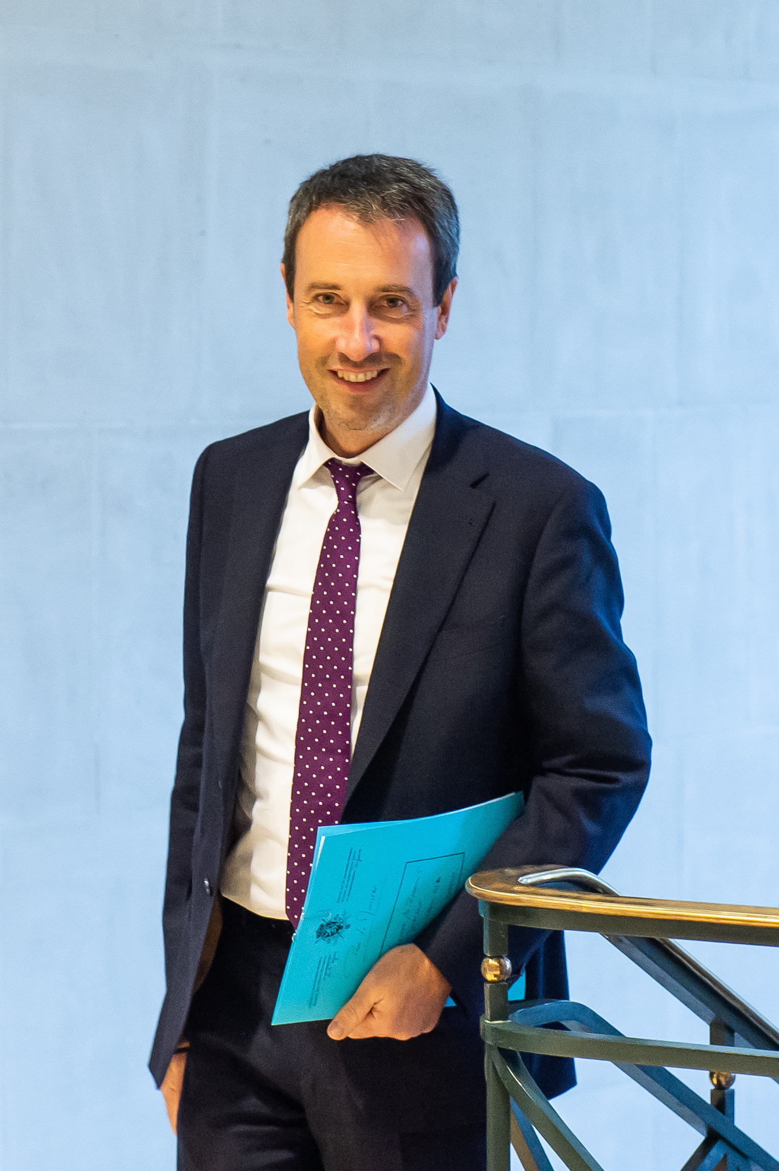 Philippe Goffin lors de la réunion au Palais d'Egmont (Bruxelles) des dix membres actuels du Conseil de sécurité des Nations Unies et des cinq nouveaux membres élus ce 3 décembre 2019